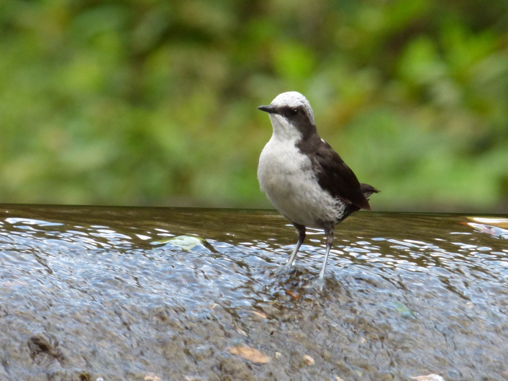 Cinclus leucocephalus (Mirlo acuático)